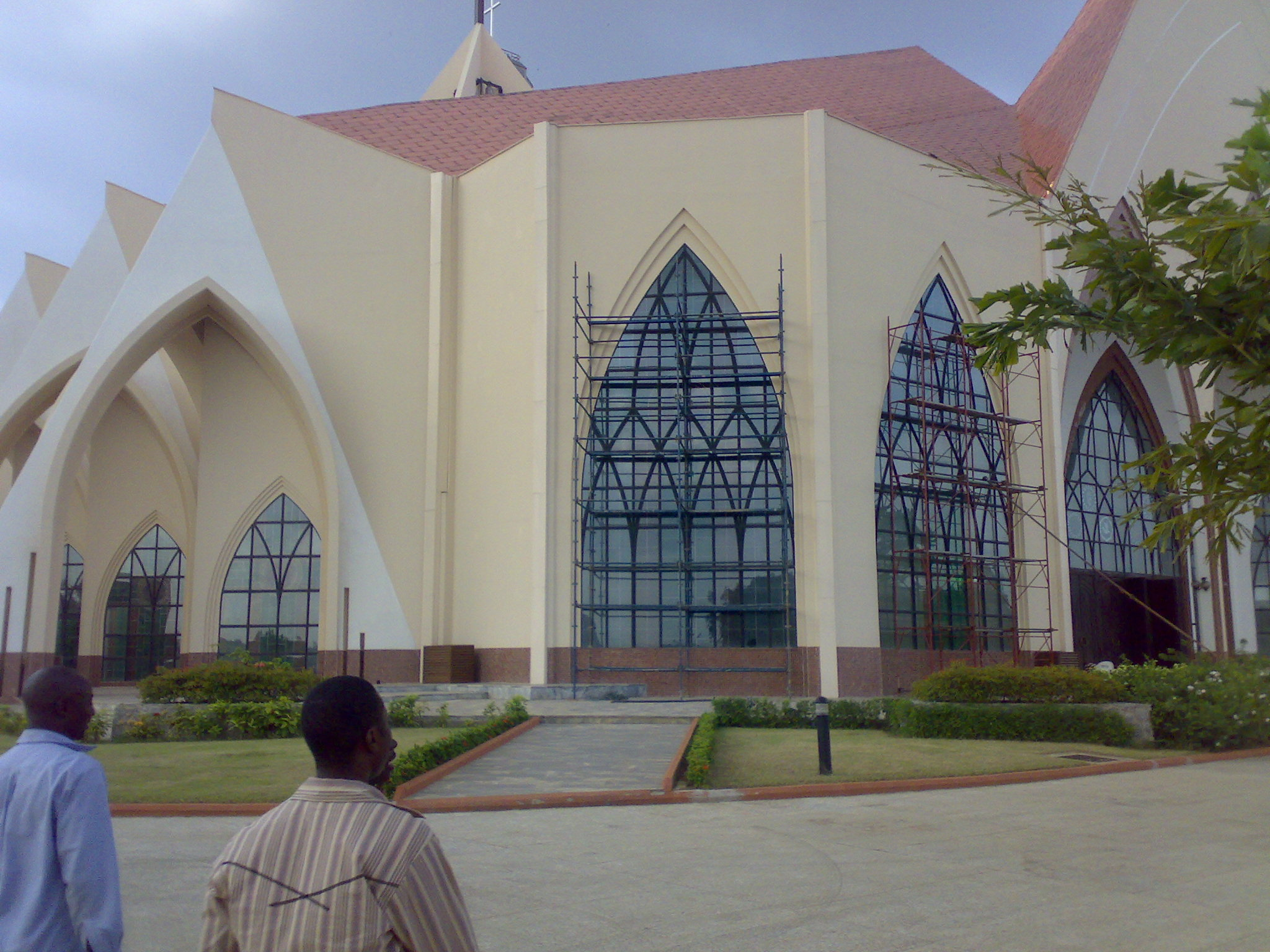 Národní křesťanský chrám v Nigerii, Afrika